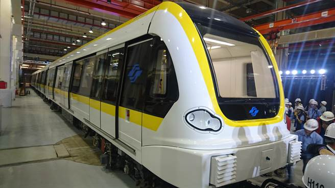 中文（台灣）: 台北捷運環狀線列車車體